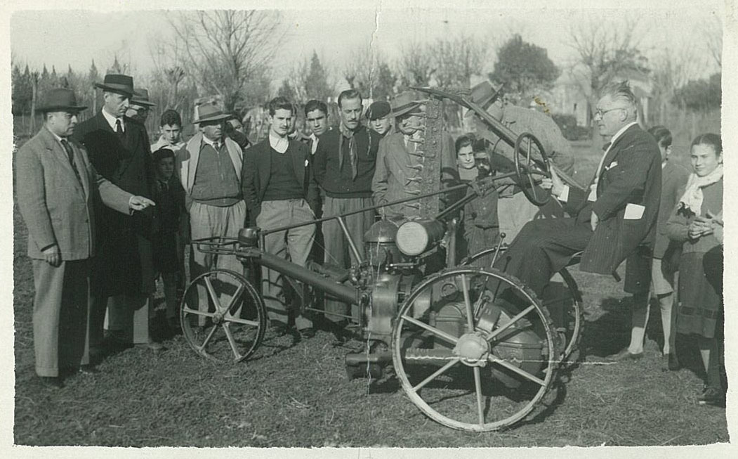 Autofalciatrice Cassani (1946)